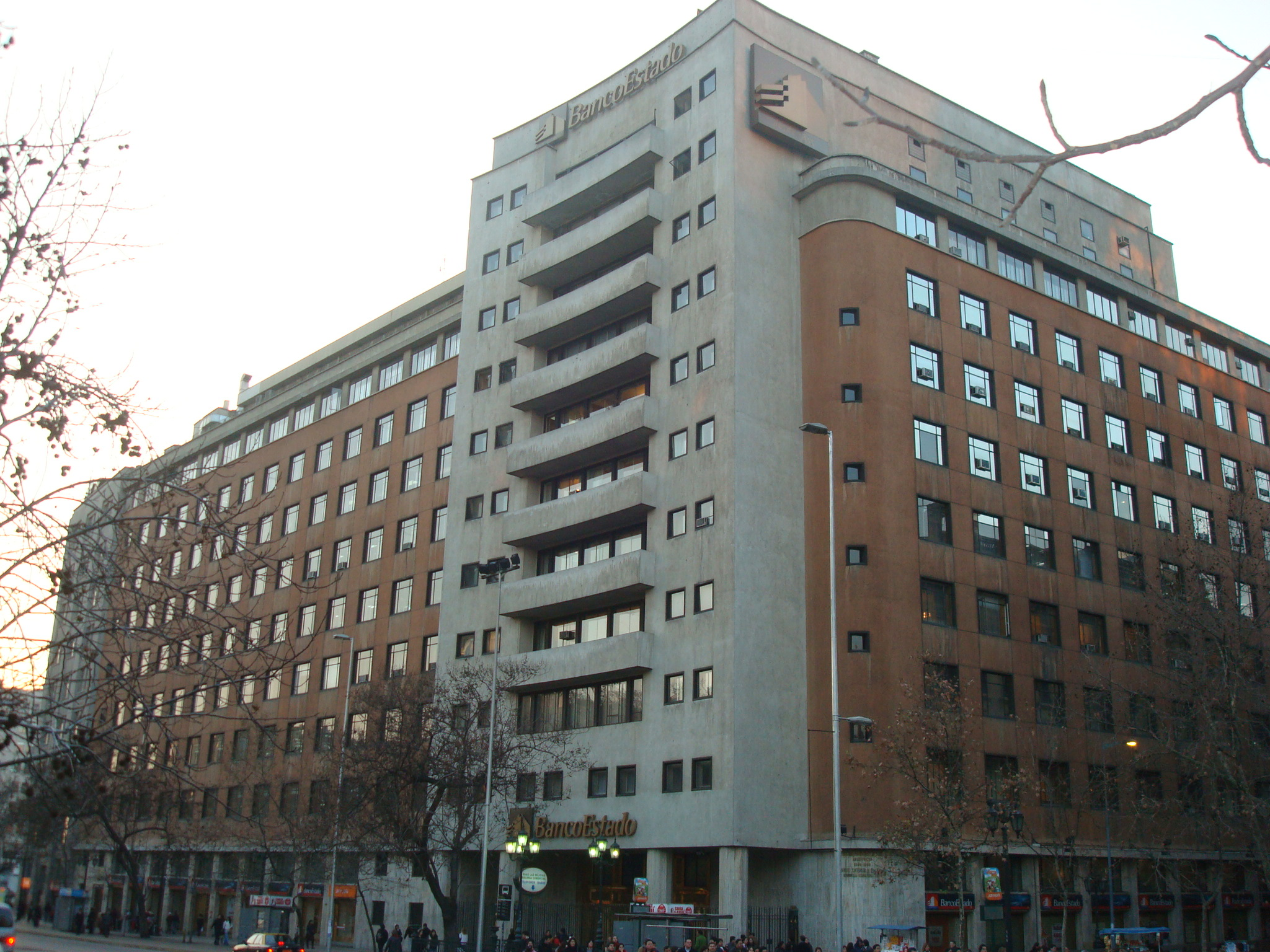 Casa Central del BancoEstado, Chile